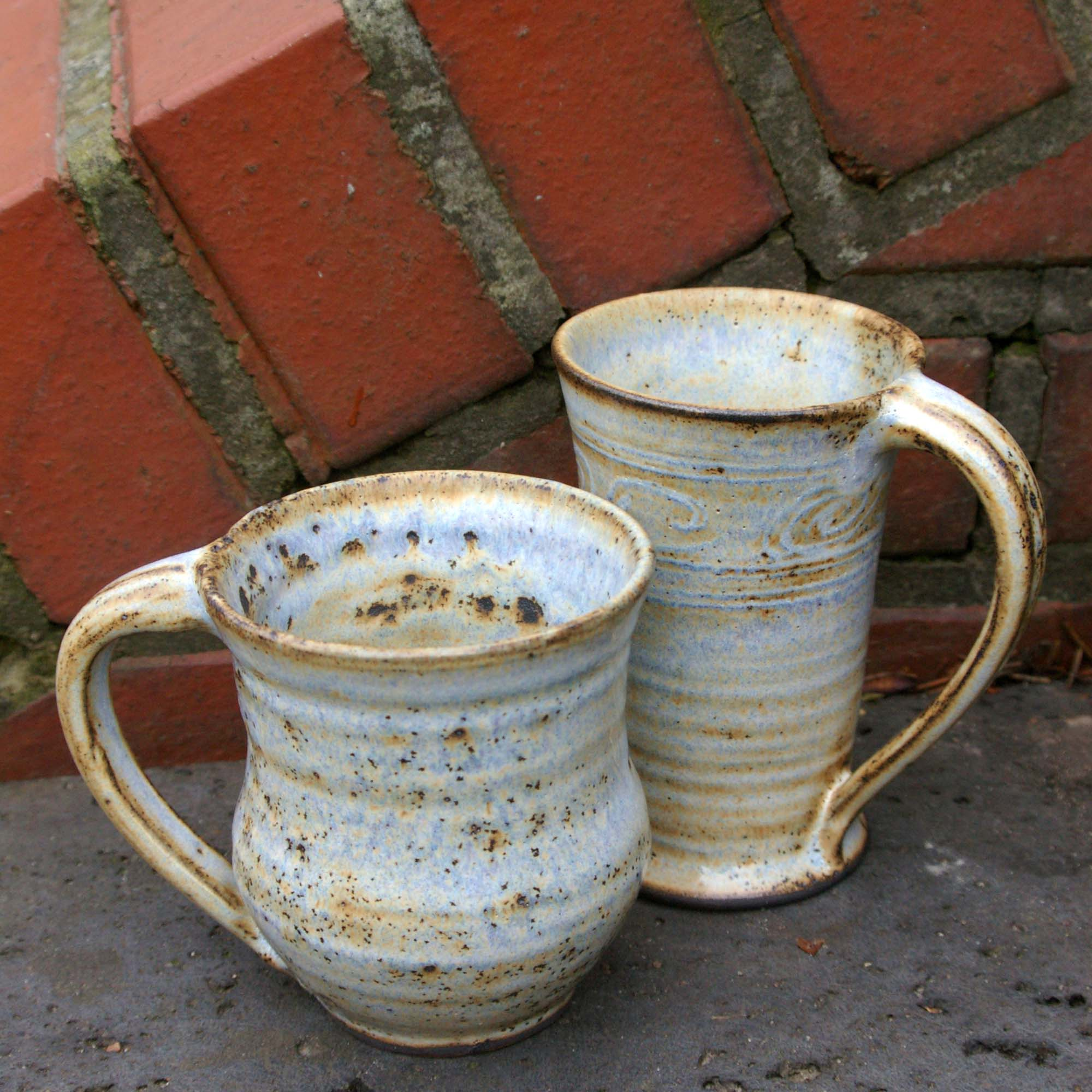 Der Burtscheider und Aachener Thermalwassertrinkbecher [Entwurf: Ulrike Tromsdorff]